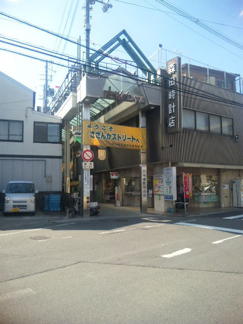 大和高田市の天神橋筋商店街東端。ここを南（写真左側）に行くと本郷通り商店街。